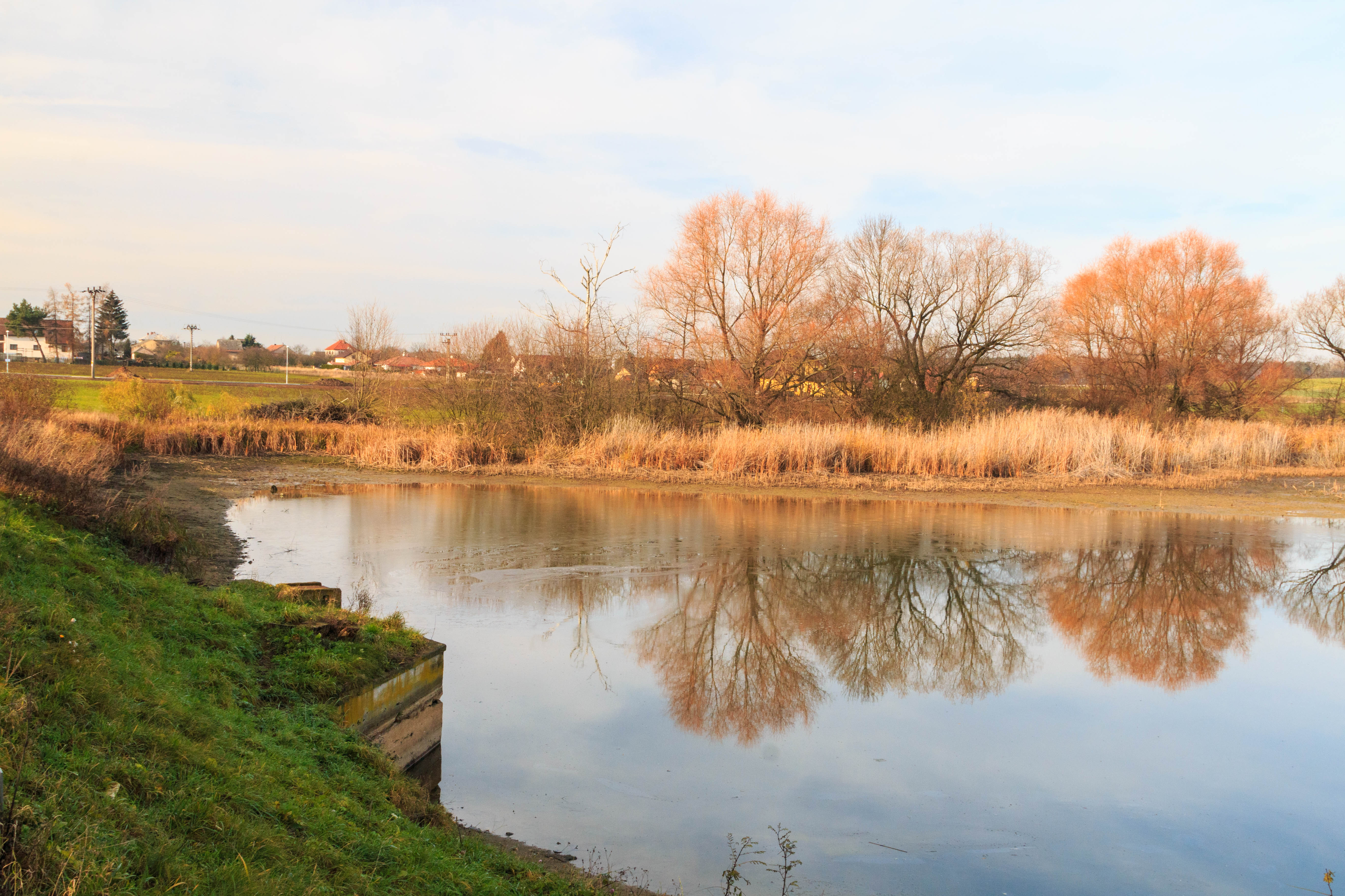 Nový rybník ve Volči Project: Vodstvo.